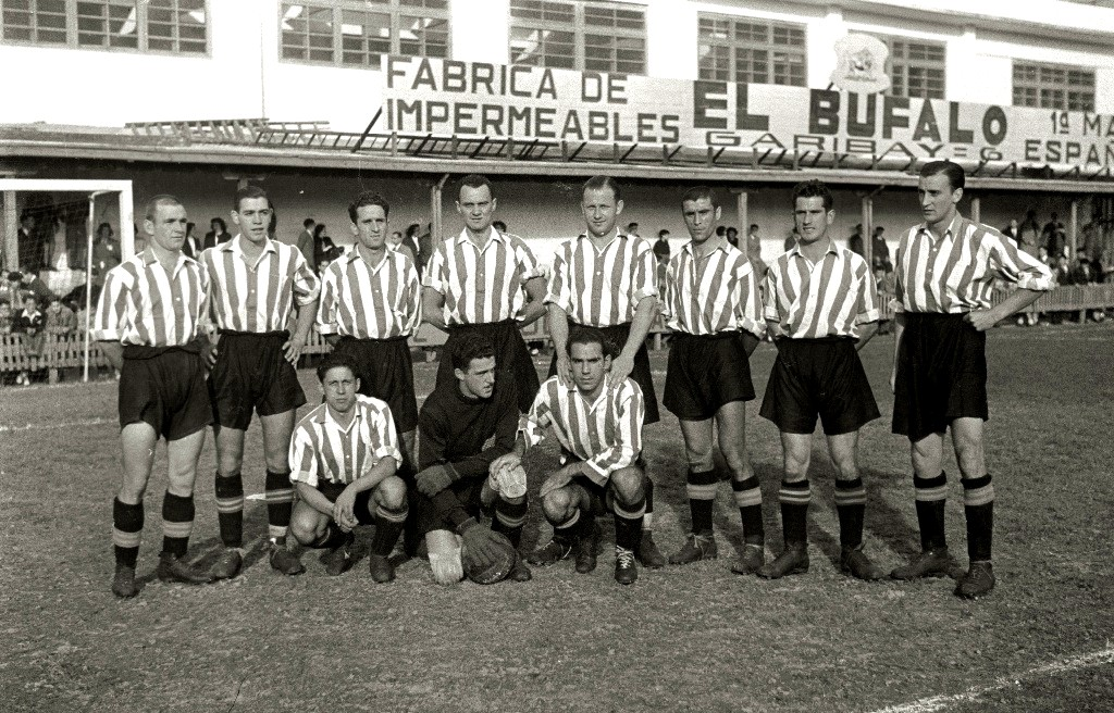 Título original: Partido de fútbol entre la Real Sociedad y el Atletic de Bilbao en el campo de Atotxa (1/5) Localización: San Sebastián (Guipúzcoa)